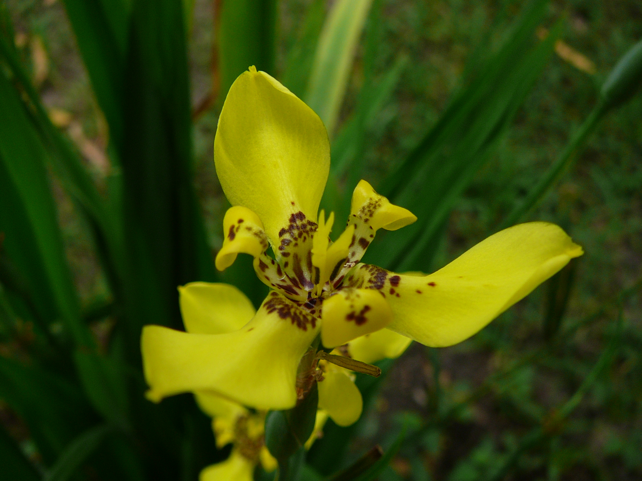 Trimezia sincorana